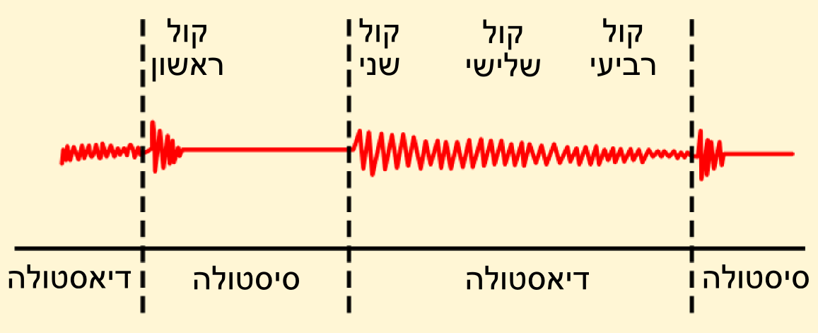 אוושה של אי-ספיקת מסתם אבי העורקים